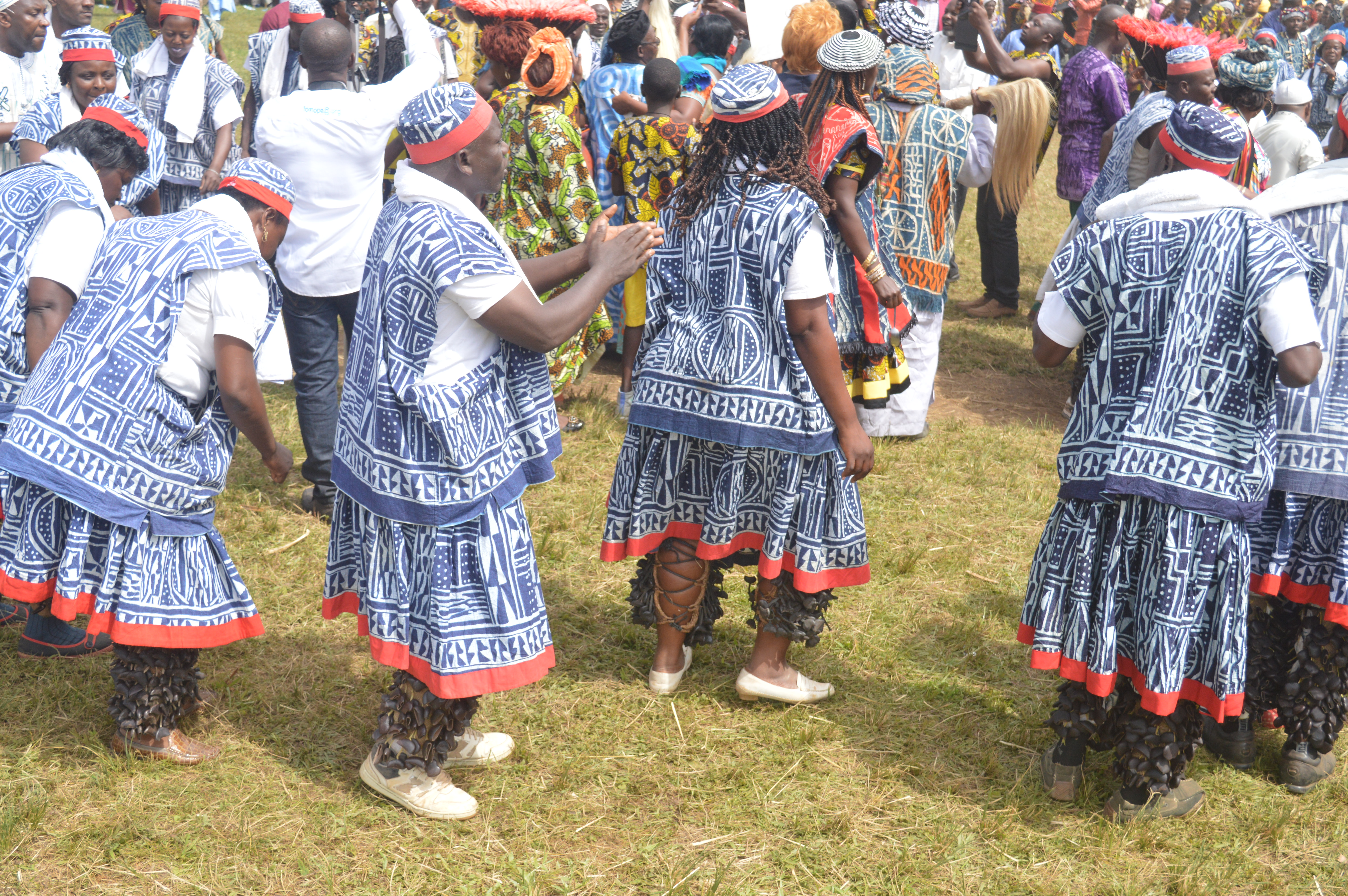 Pendant les funérailles en pays bamiléké This is an image from Cameroon